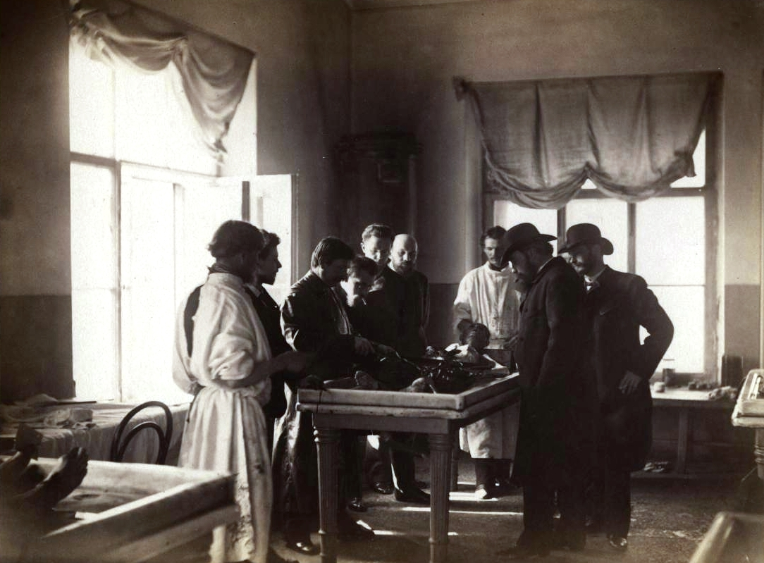 В покойницкой. Прозектор показывает потроха умершего проф. Нечаеву. (Обуховская больница), 1887. - Альбуминовый отпечаток